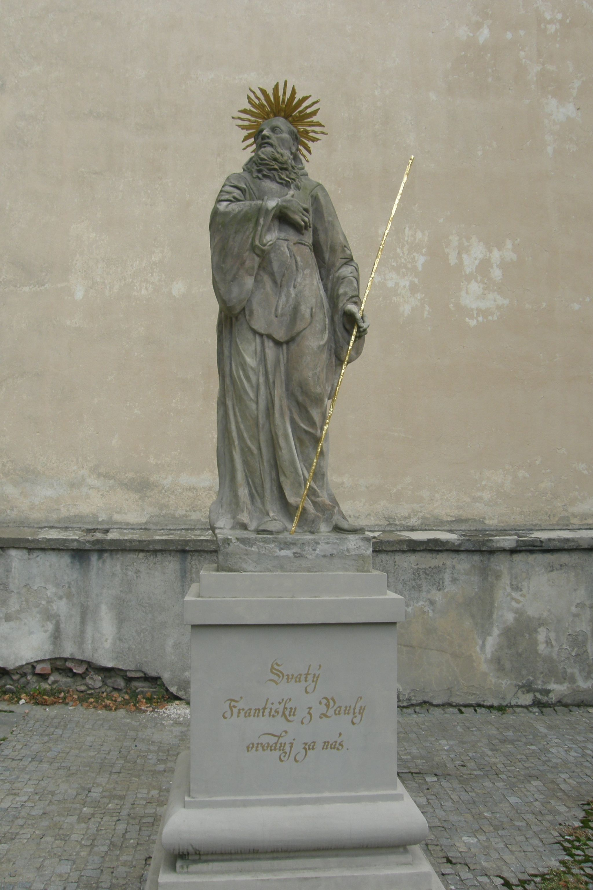 Socha sv. Františka z Pauly (Vranov), Vranov, u S průčelí kostela Narození Panny Marie, Vranov